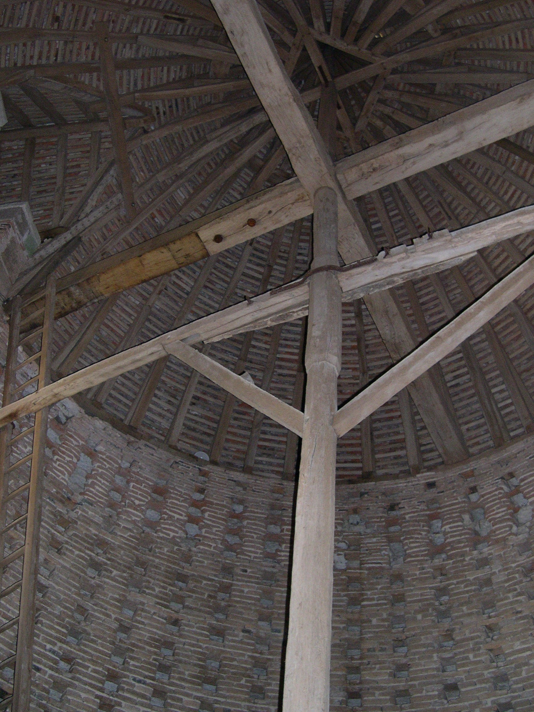 Taubenschlag des Schloss Talcy (Loir-et-Cher)